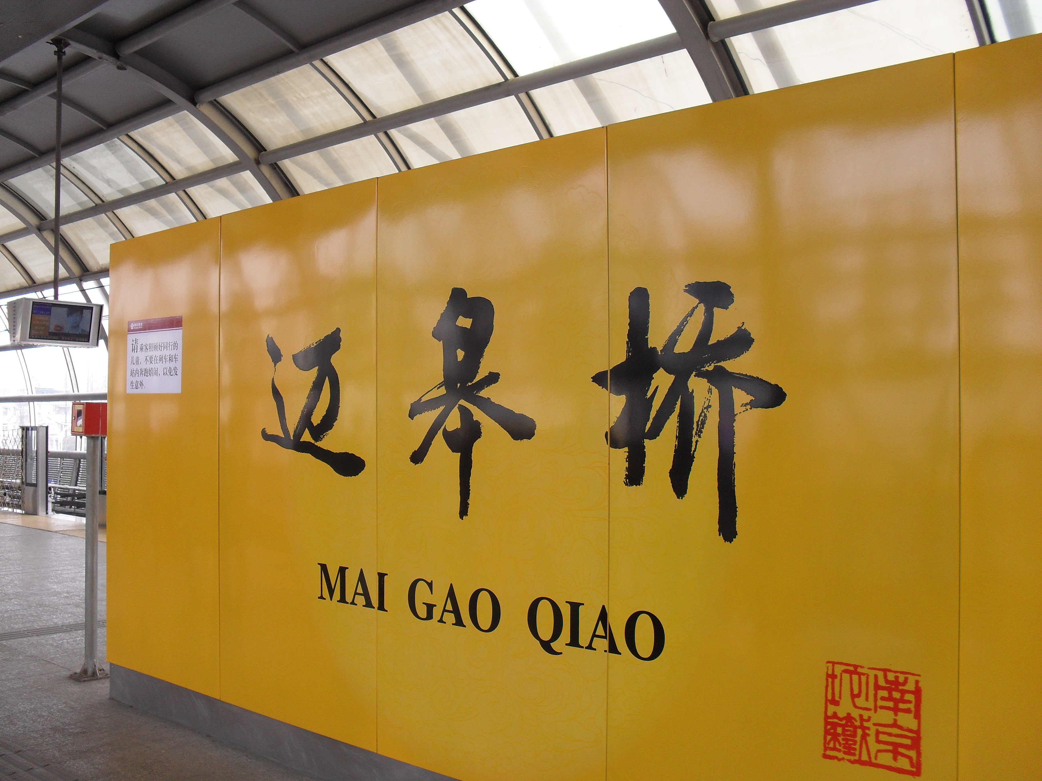 南京迈皋桥空中地铁站